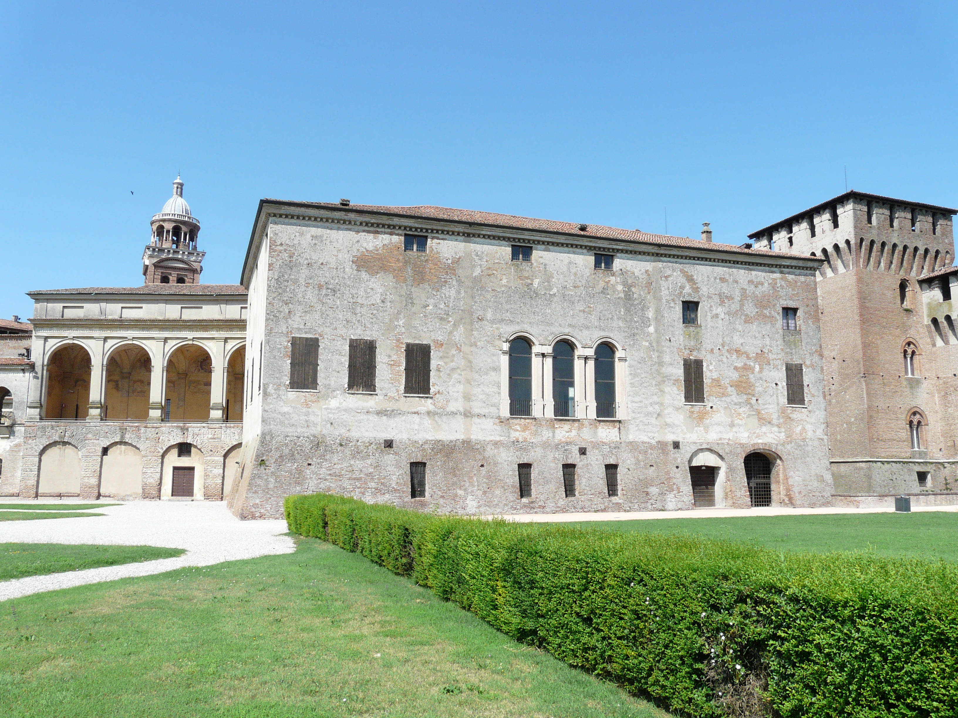 Castello di San Giorgio, Mantova, Lombardia, Italia